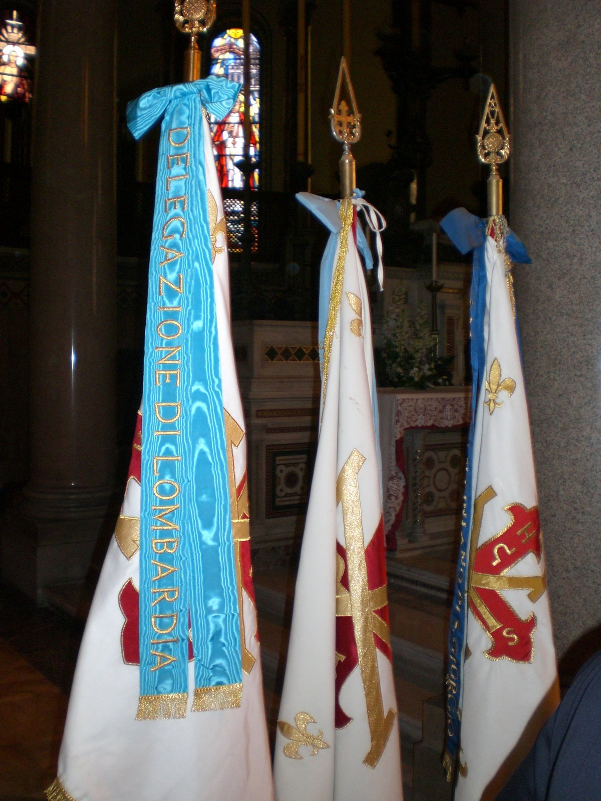 Étendards de l'Ordre sacré et militaire constantinien de Saint-Georges